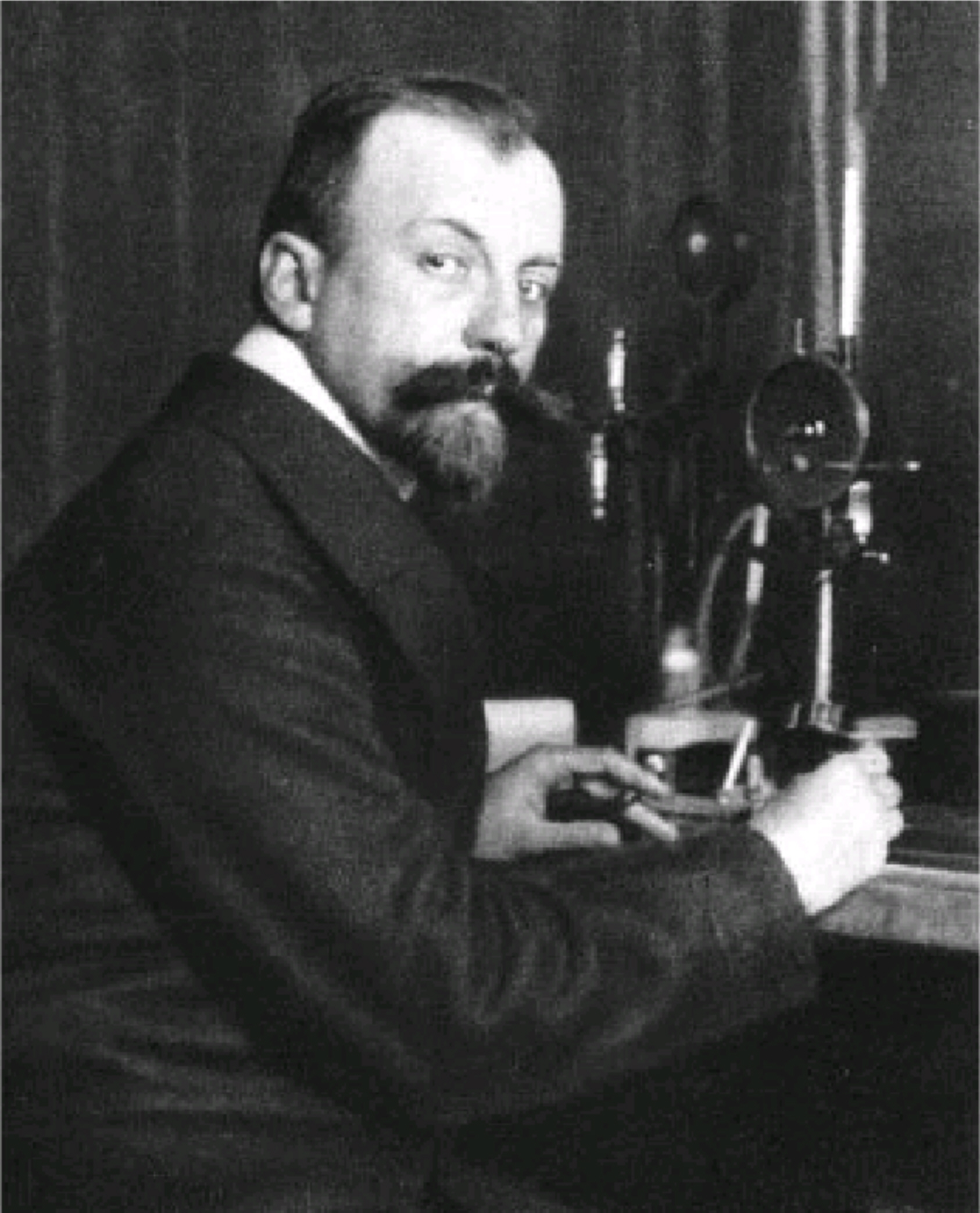 Carl Dietrich Harries (* 5. August 1866 in Luckenwalde; † 3. November 1923 in Berlin)